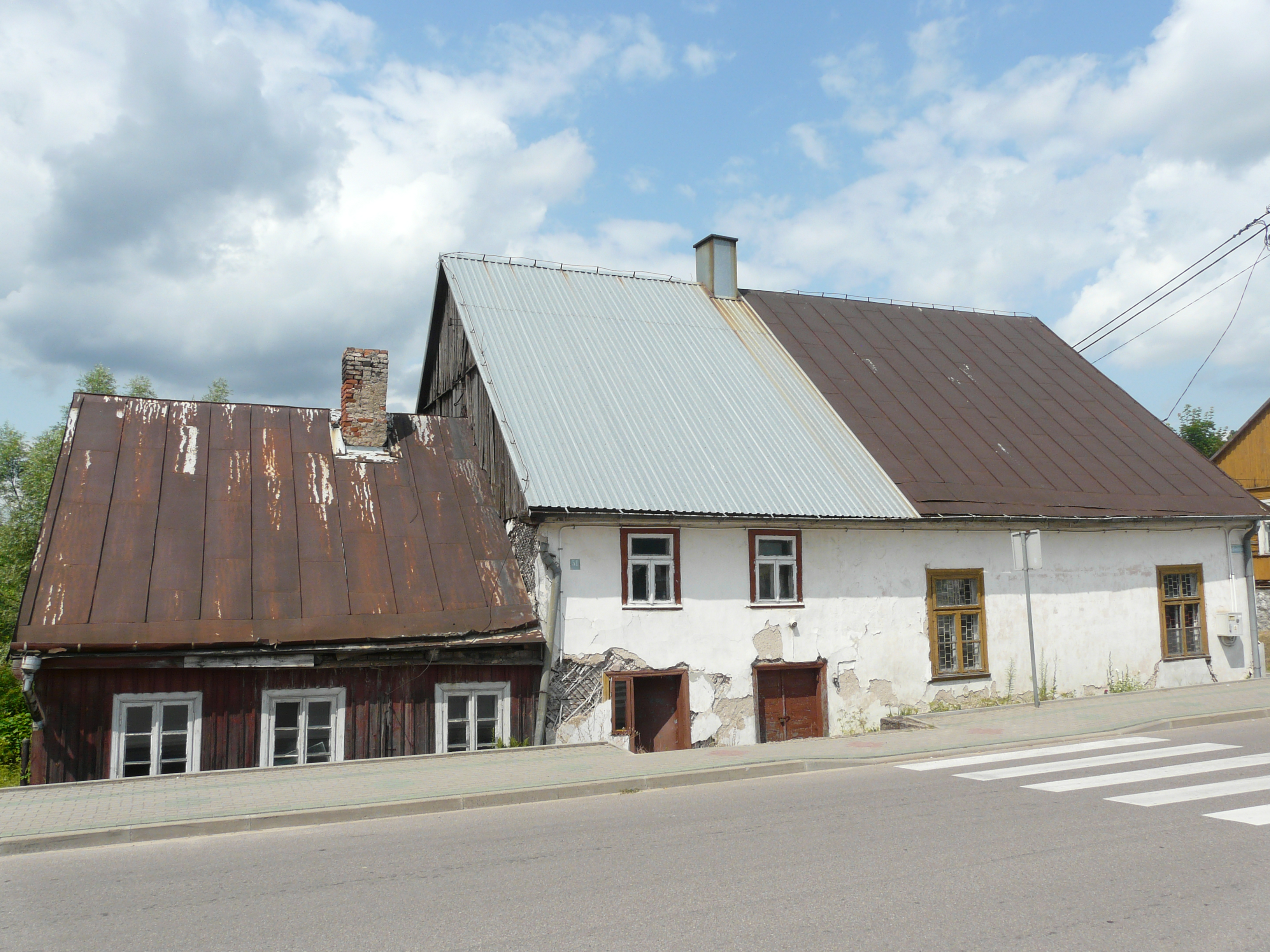 Synagoga i szkoła talmudyczna w Puńsku, ulica Mickiewicza 58